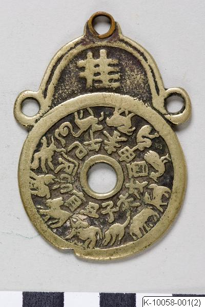 Hängplatta, graverad på båda sidorna. K-10058-001 Mongolia.